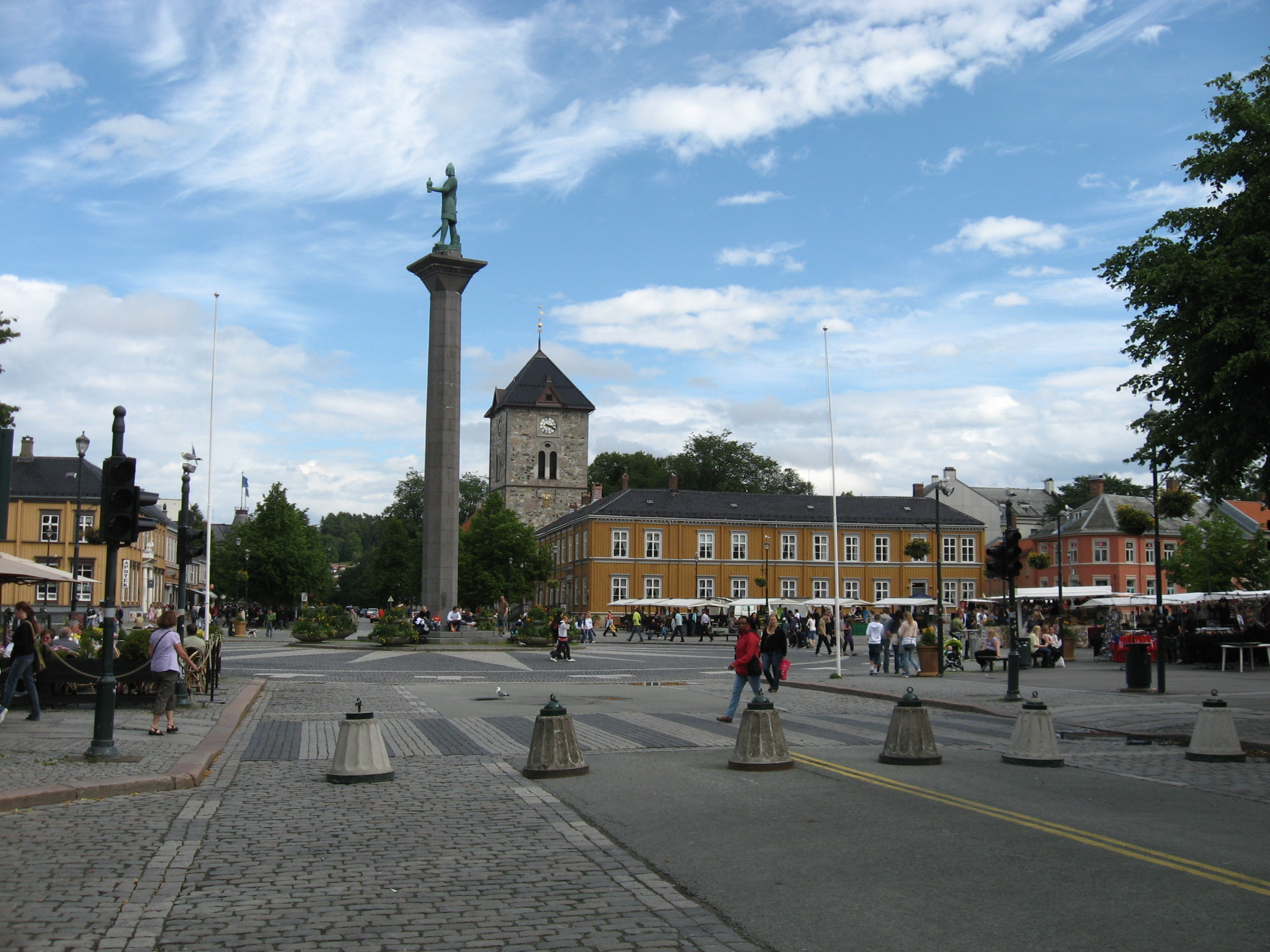 Het Torvet plein in Trondheim